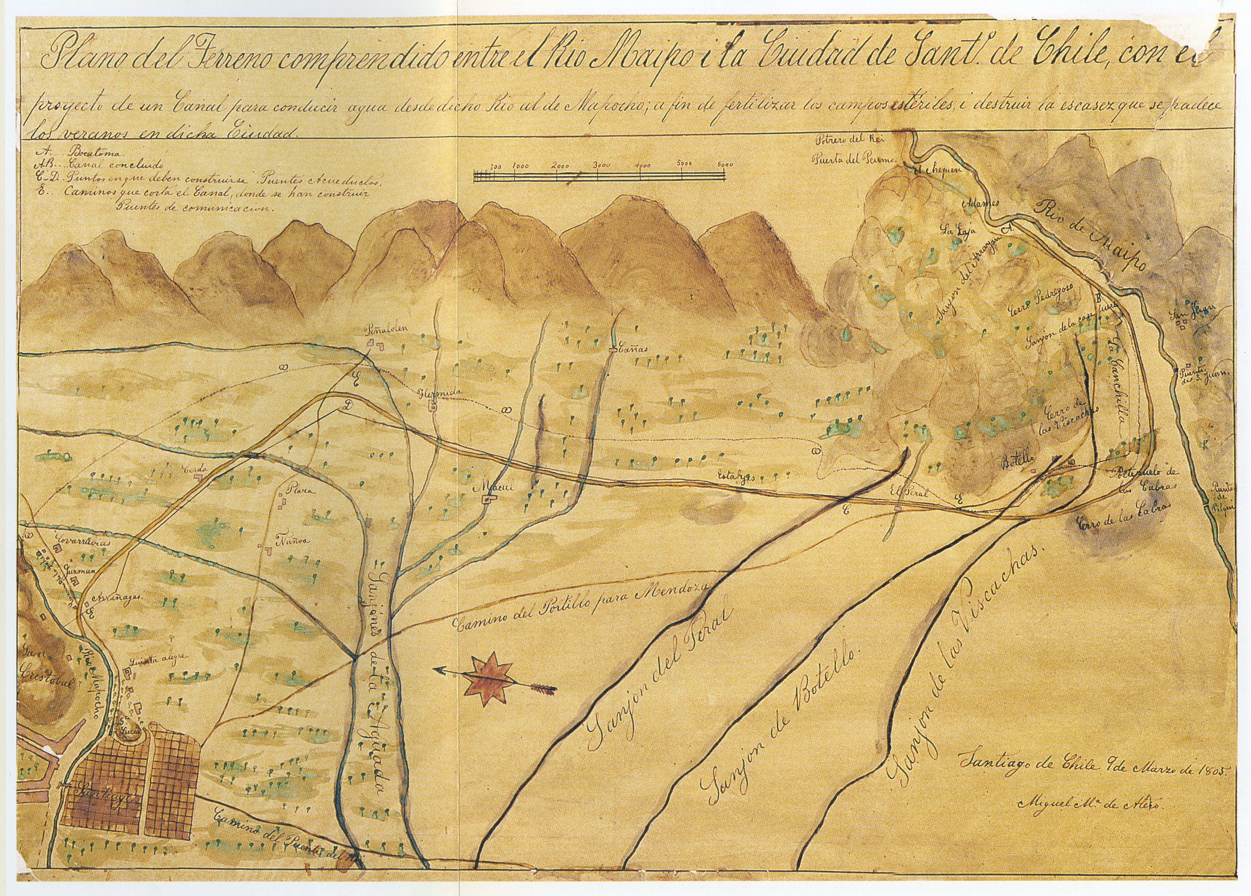 Trazado del Canal San Carlos, en Santiago de Chile, 1805